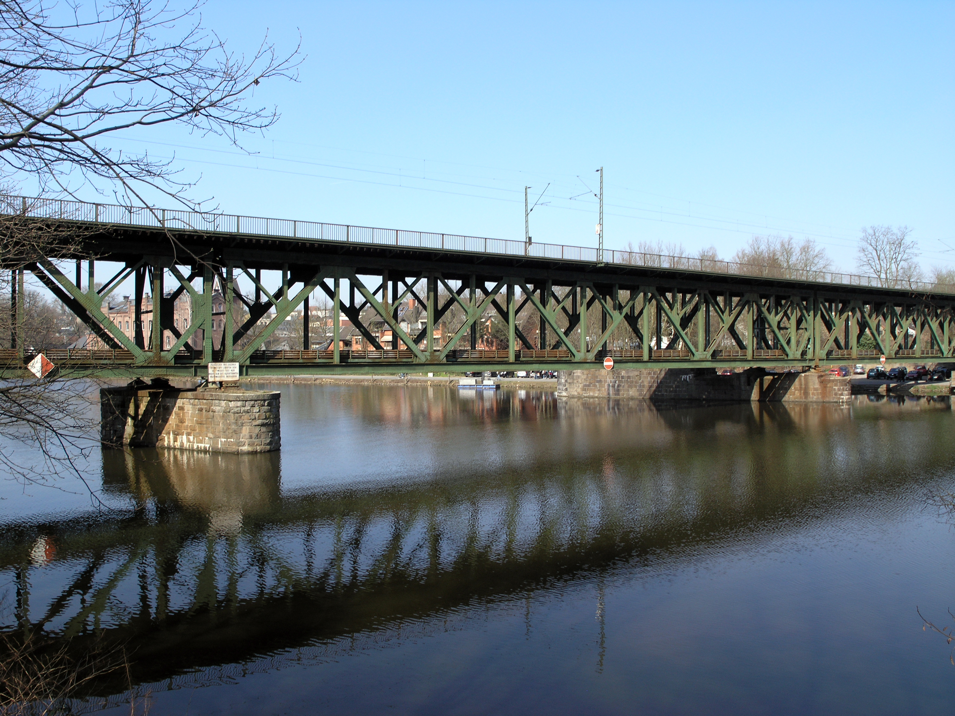 Северный Рейн-Вестфалия, Эссен - кеттвигский железнодорожный мост